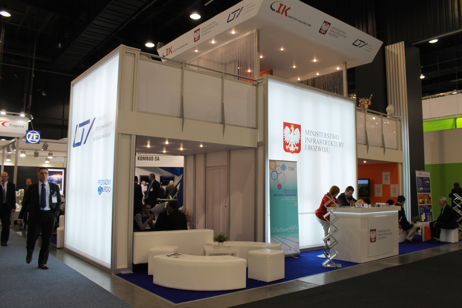 Stoisko Instytutu Kolejnictwa, Urzędu Transportu Kolejowego i Ministerstwa Infrastruktury i Rozwoju podczas targów Trako 2015. The making of this document was supported by Wikimedia Polska Association, within Wikigrant no. WG 2015-34. English | polski | +/−